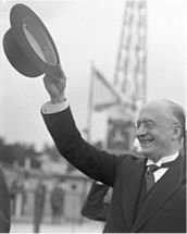 Die Abreise des englischen Premierministers Ramsay MacDonald von dem Zentralflughafen in Berlin-Tempelhof! Reichskanzler Dr. Brüning (links) und Reichsaussenminister Dr. Curtius (rechts) winken lebhaft beim Abflug des englischen Premierministers Ramsay MacDonald.